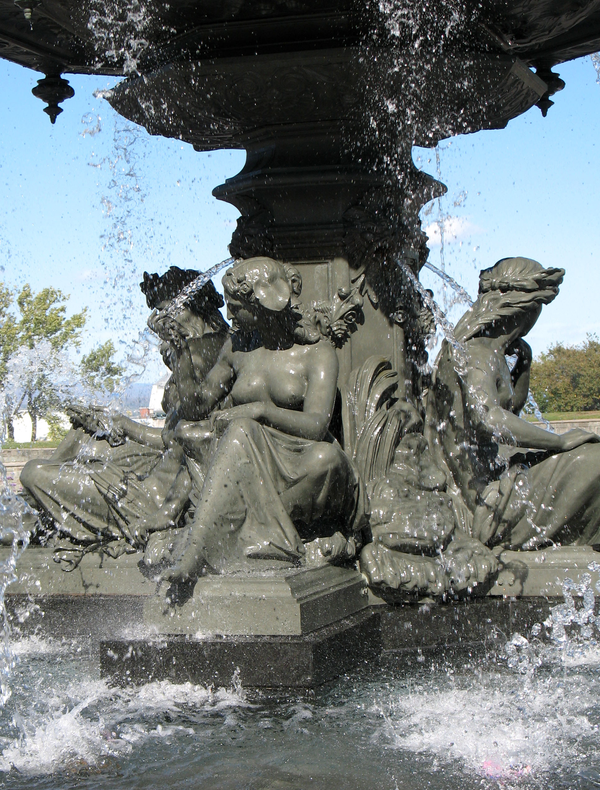 Fontaine de Tourny de Québec, Ville de Québec, Province de Québec, Canada